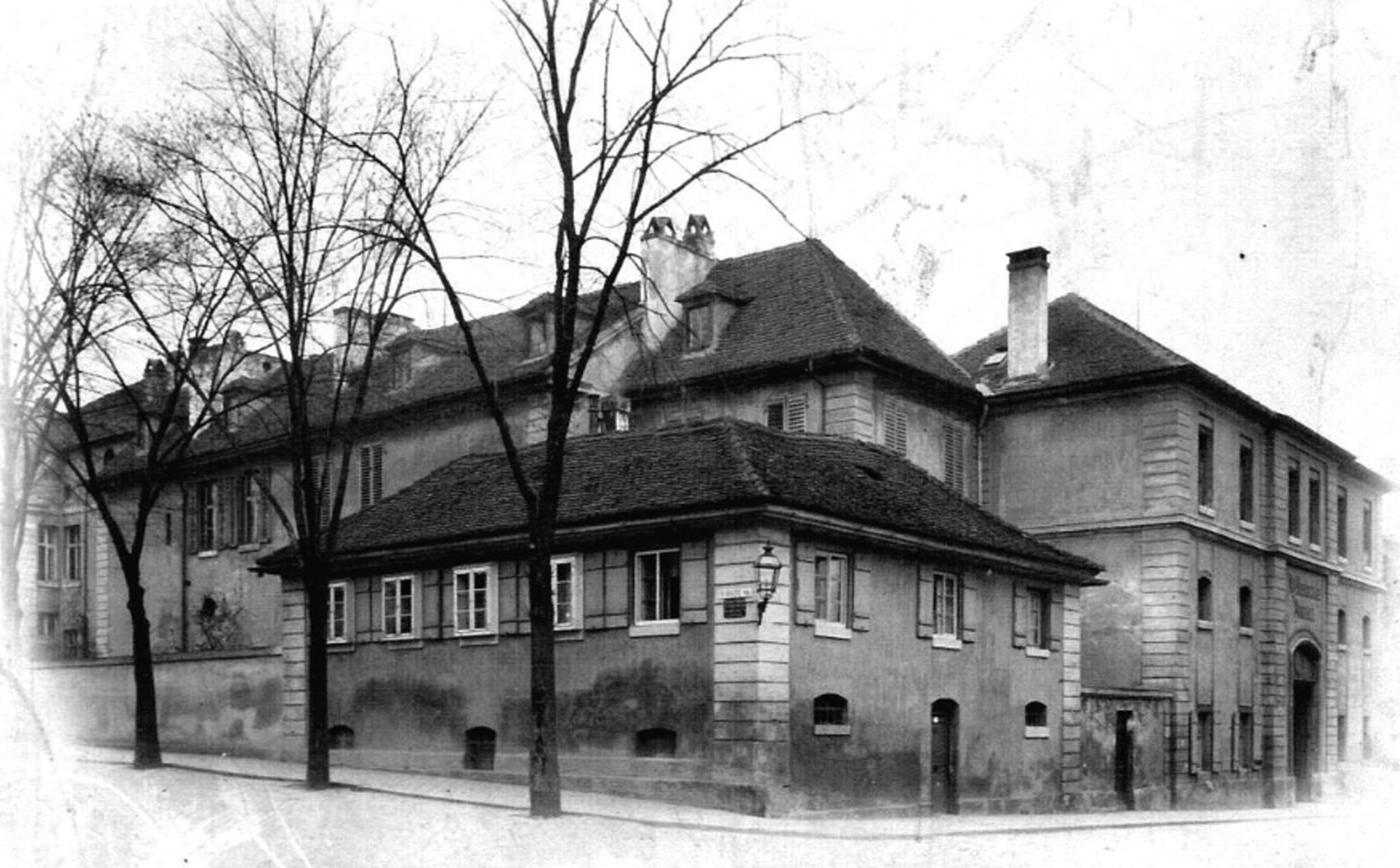 Zocha-Schlößchen, südöstliche Ansicht (Ecke Bahnhofsplatz/Bischof-Meiser-Straße)